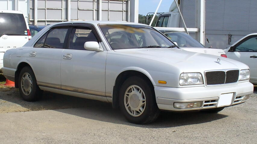 2代目日産・シーマ